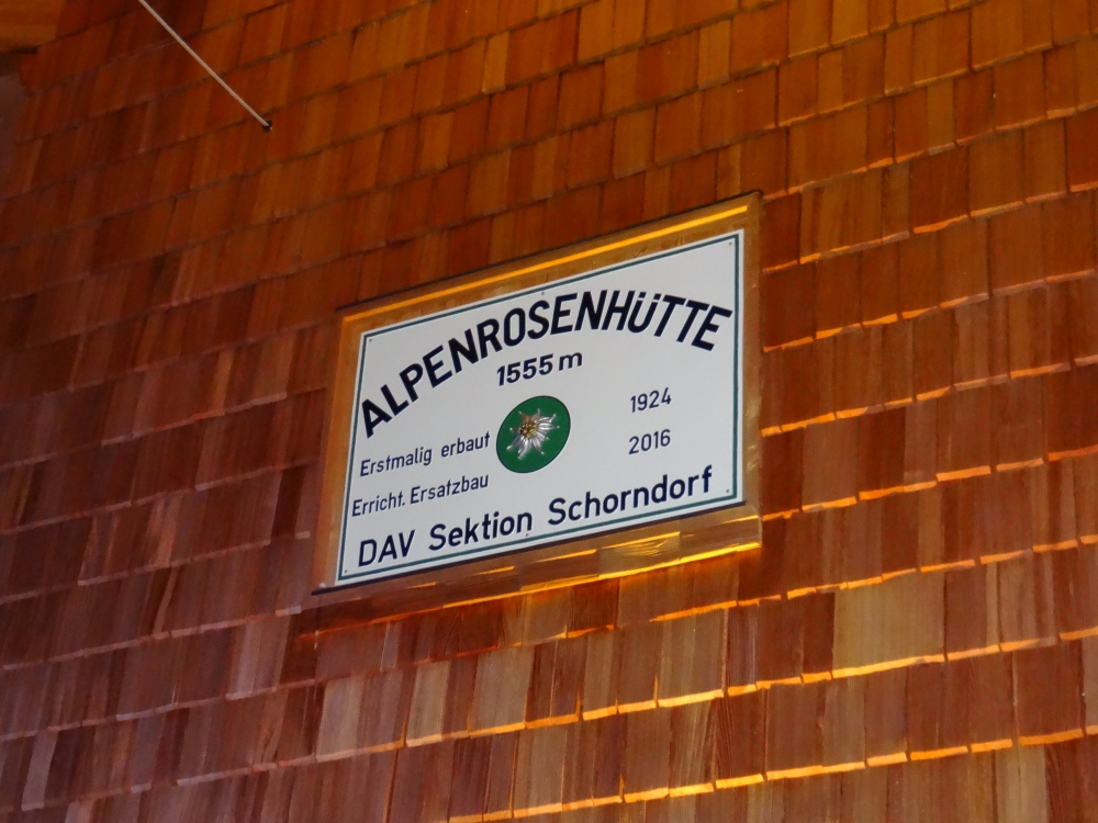 Alpenrosenhütte des DAV Sektion Schorndorf e.V. in den Kitzbüheler Alpen, Westendorf, 1555 m ü NN, Ersatzbau 2016